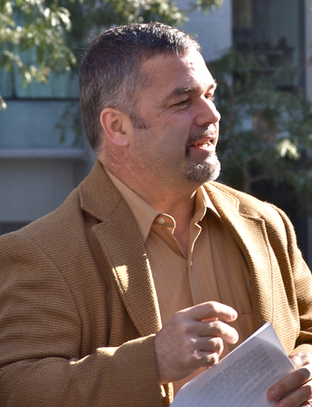 Daniel Breton lors de la campagne électorale fédérale canadienne de 2008Le cadrage de cette version de la photo est modifié par rapport à l'originale.